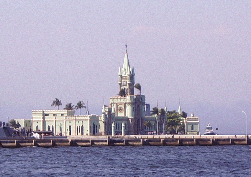 Palace of Ilha Fiscal, Rio de Janeiro, Brazil